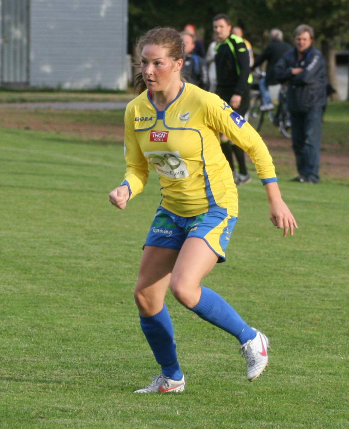 Fotballspilleren Elen Melhus